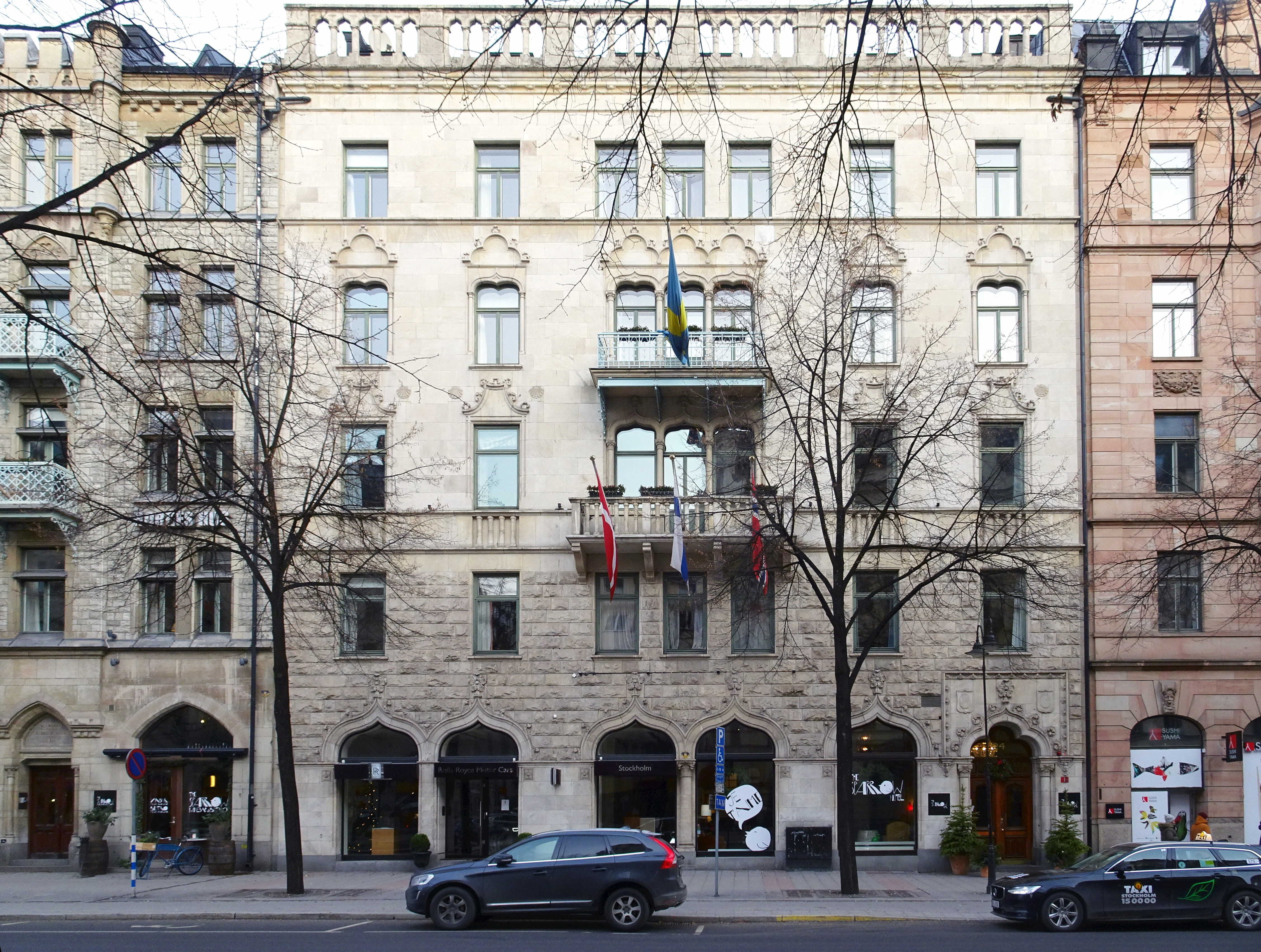 Landbyska verket 4 - hus 2, Birger Jarlsgatan 24, Nybyggnadsår 1897 - 1899, Upphovsman Oscar Herrström (Byggherre) Oscar Herrström (Byggmästare) S. Kjellberg (Arkitekt)